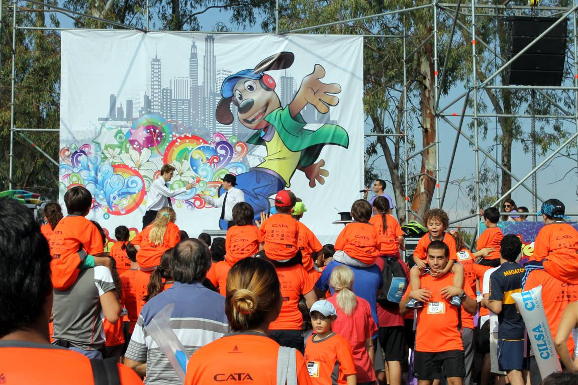 Marcelo en plena locución de la Maratón Tintero 2015